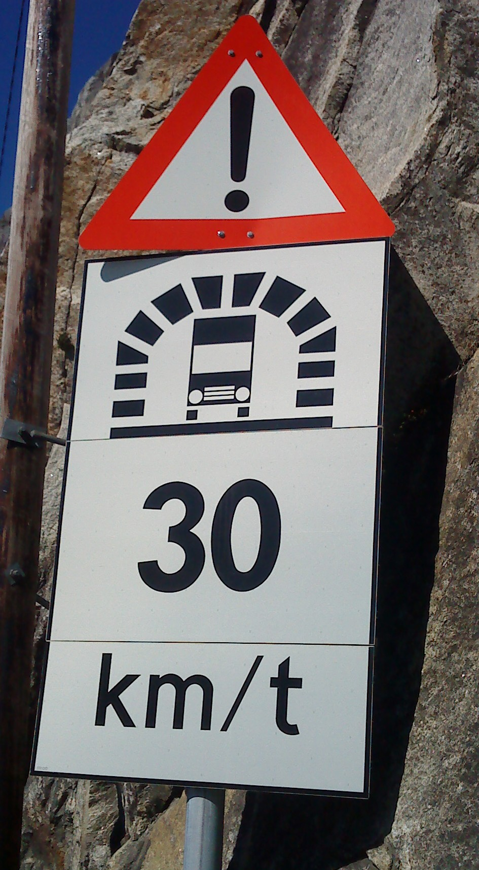 Skilt utenfor korsnestunnelen